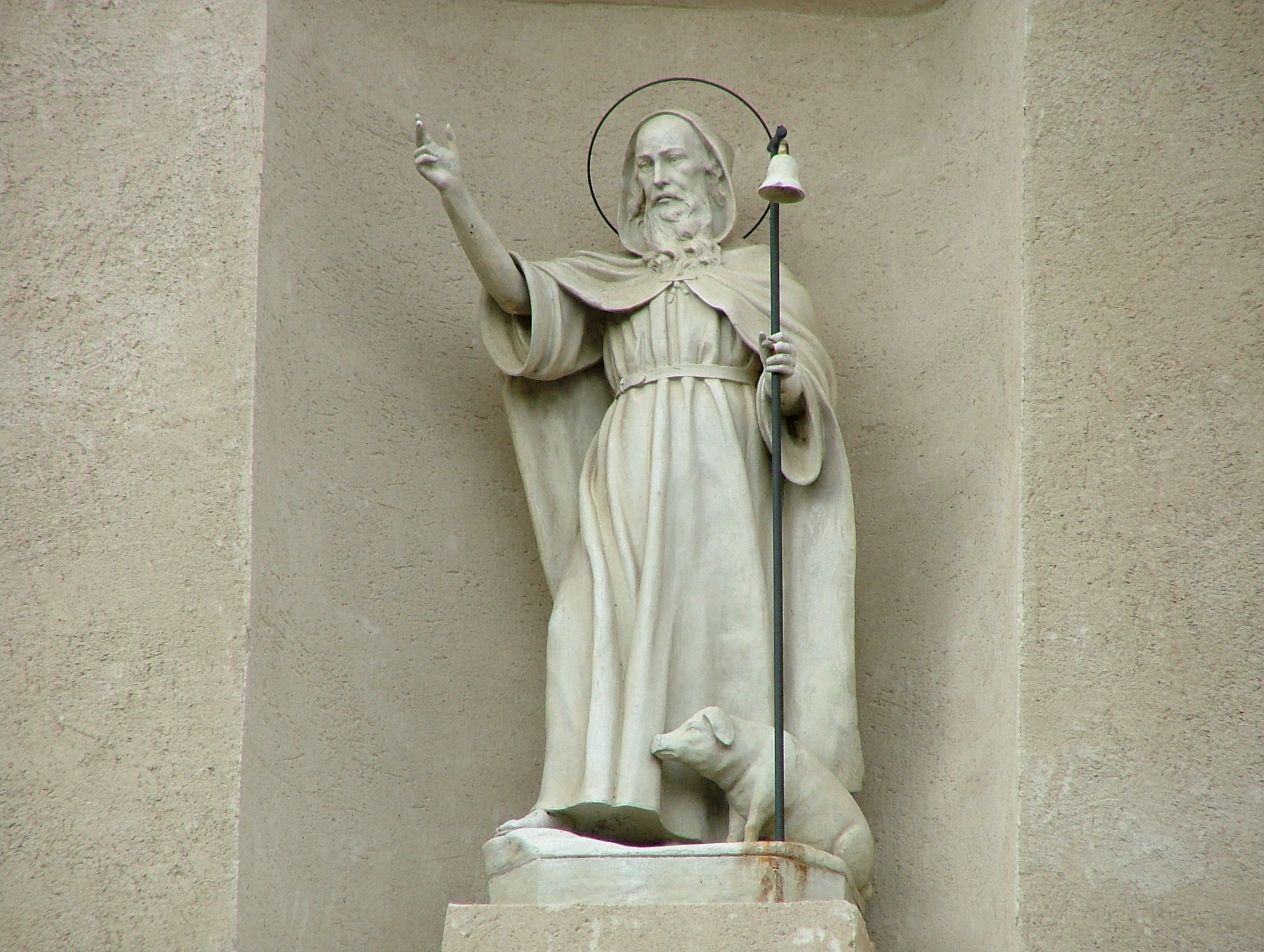 Statua di S. Antonio Abate benedicente. Autore: Rocco Stasi. Fonte:fatta da me. Statua di S. Antonio Abate collocata sull'esterno dell'abside della omonima chiesa, nel rione S. Maria. Licenza:GFDL, sono l'autore.